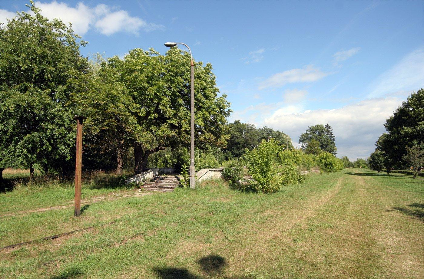 Dawna stacja Białowieża Pałac. Widok w kierunku wschodnim